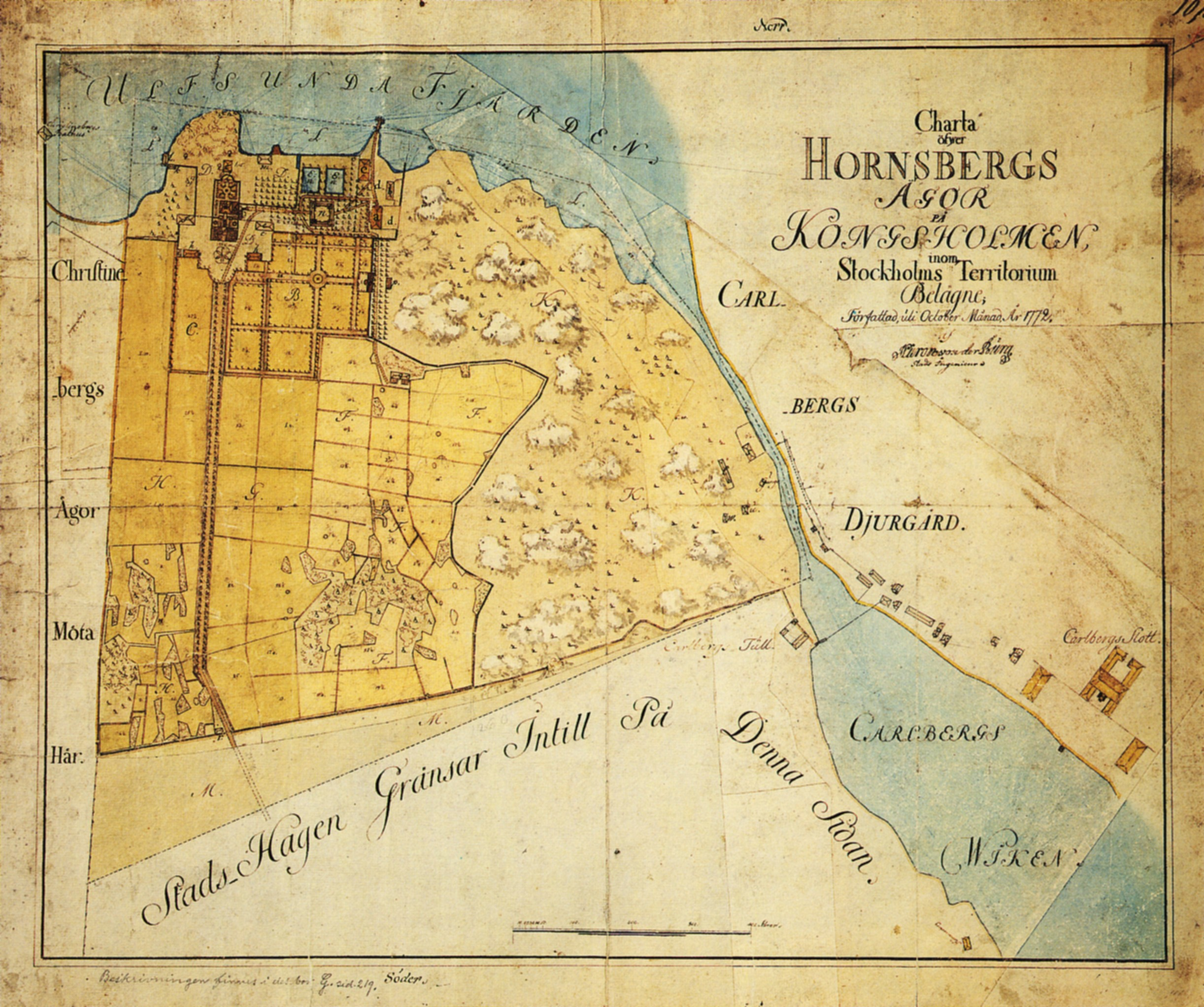 Charta öfwer Hornsbergs Ägor på Kungsholmen i Stockholms Territorium Belägne.